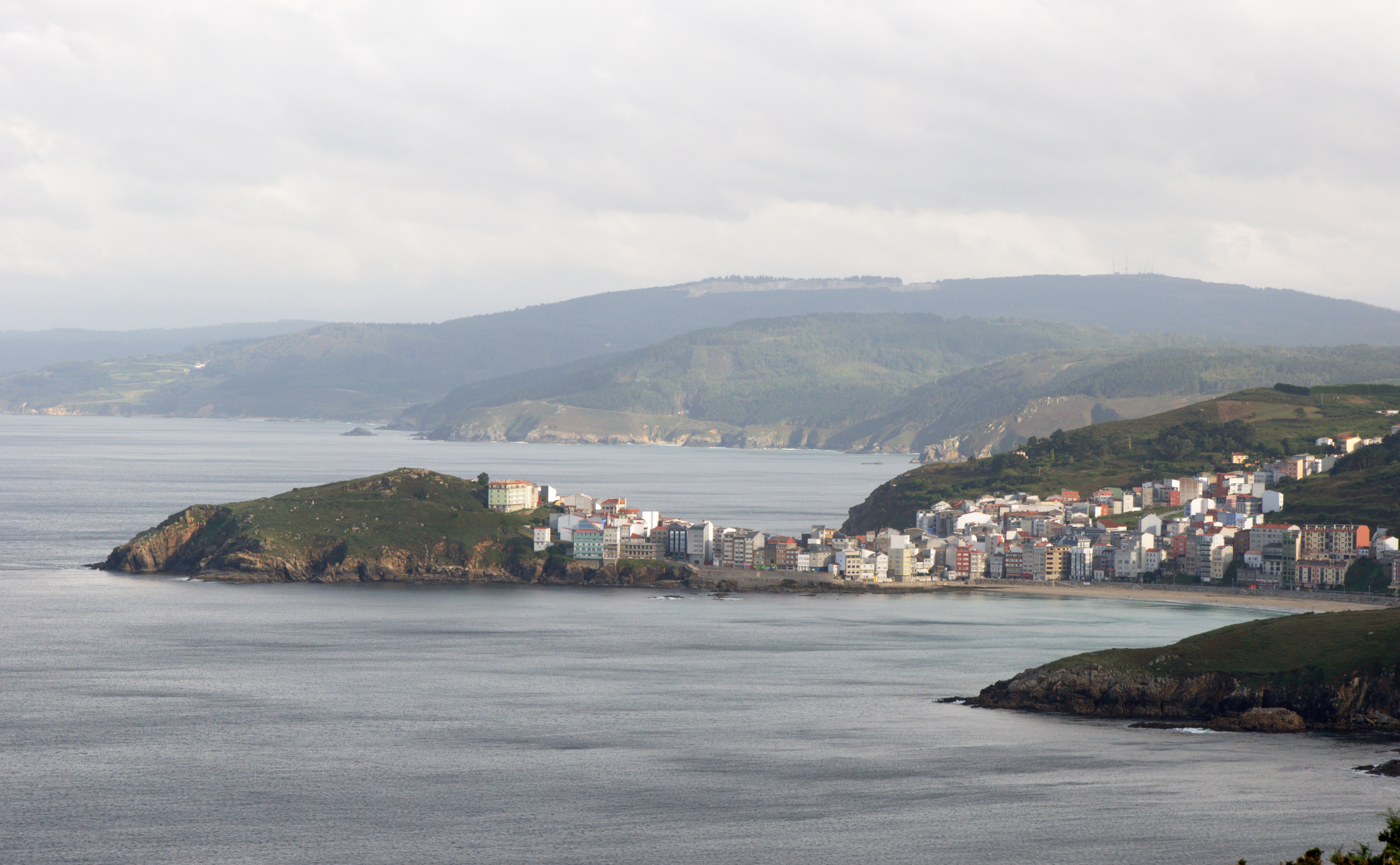 Malpica de Bergantños